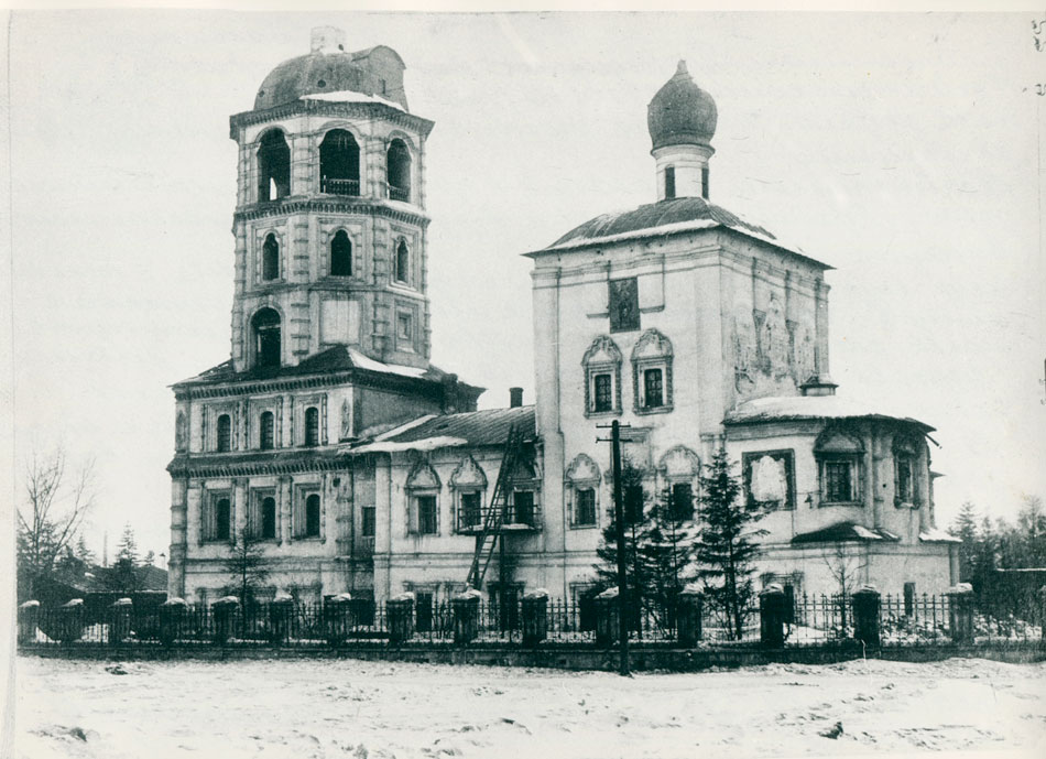 г. Иркутск. Спасская церковь подготовлена к сносу. Начало 30-х годов.